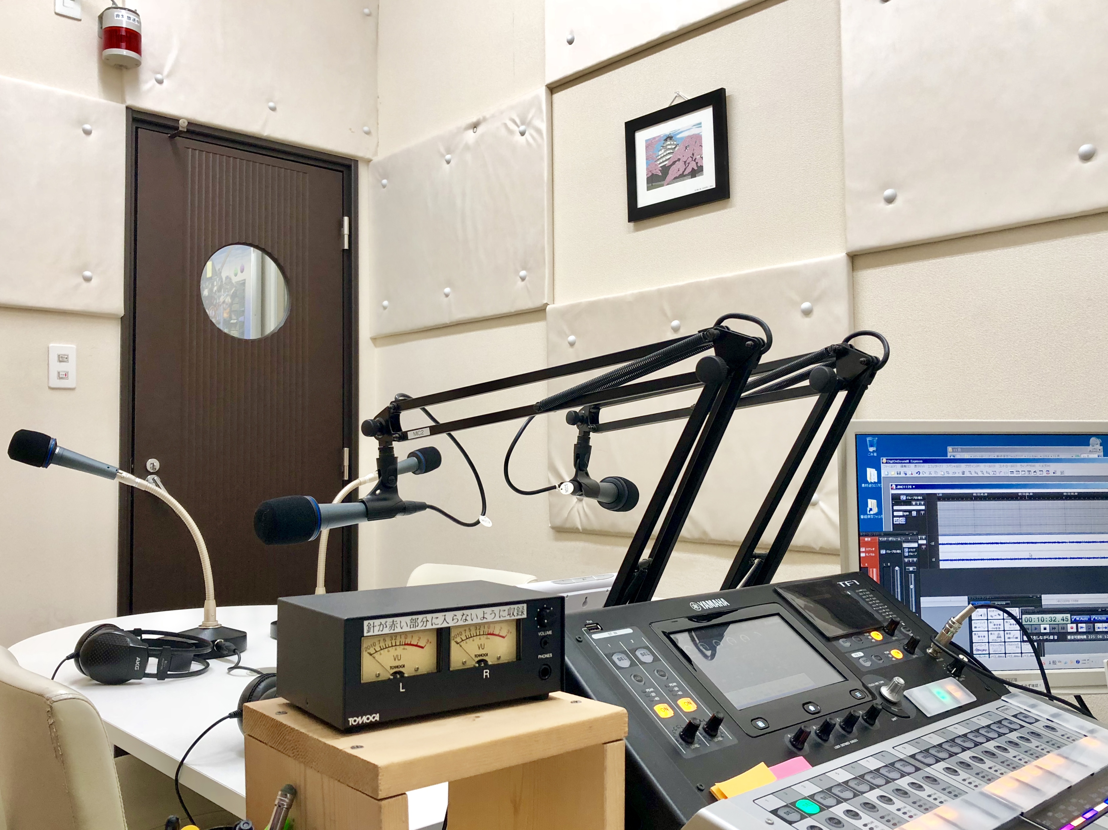 ＦＭポコ内観2